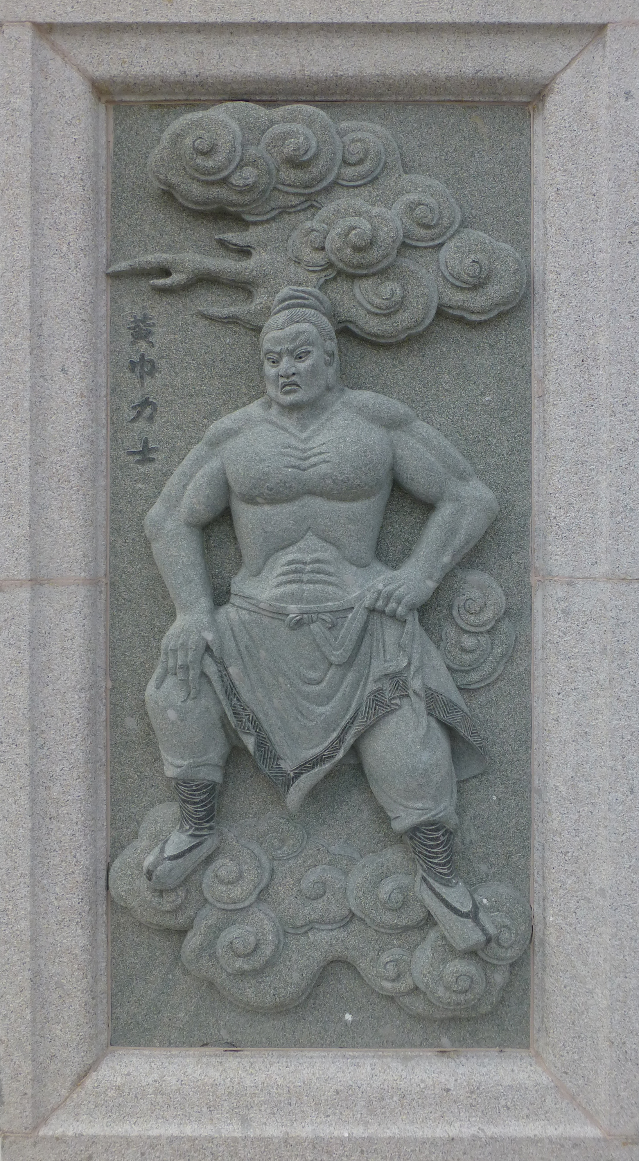 038 Huang jin li shi, Investiture of the Gods at Ping Sien Si, Pasir Panjang, Perak, Malaysia Photograph from the Ping Sien Si Temple in Perak, Malaysia taken by Anandajoti.